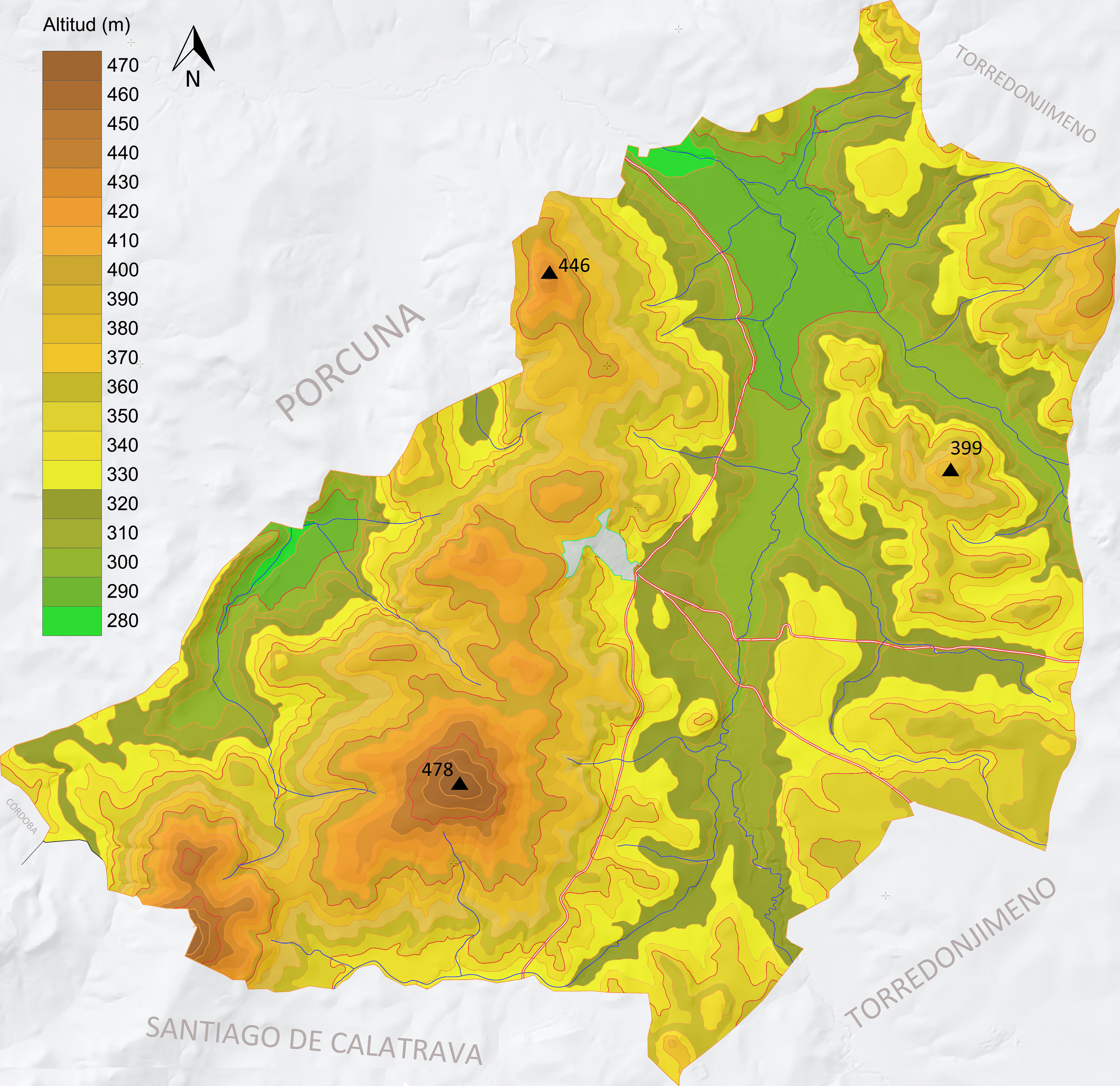 Altimetría Higuera de Calatrava